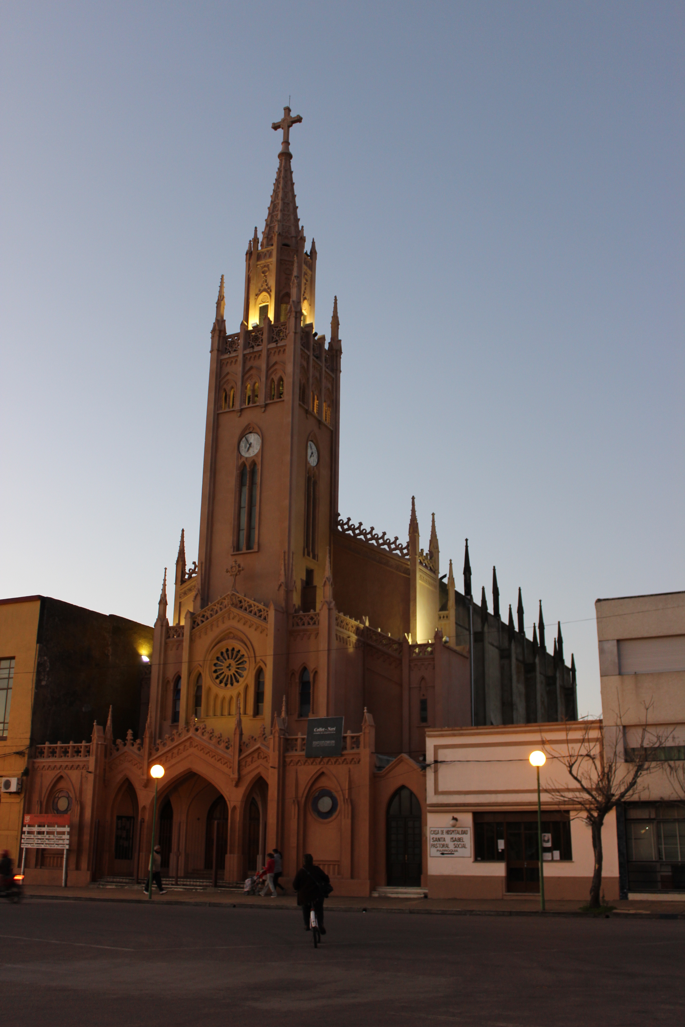 Parroquia Santa Isabel. Ubicada en el departamento de Tacuarembó